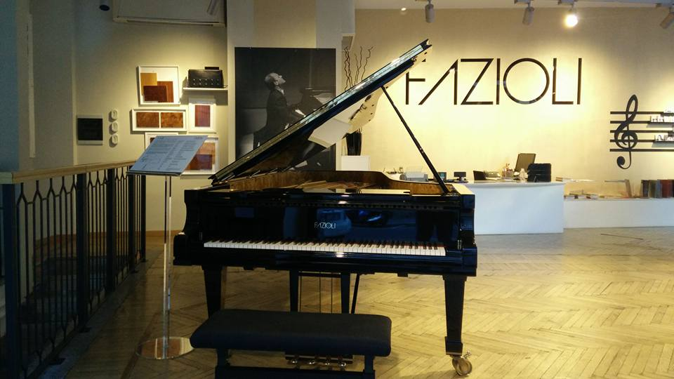 Foto scattata nel mese di gennaio del Fazioli F308 nello show-room Fazioli.